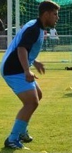 Bergougnoux lors d'un match amical du Tours FC contre Châteauroux (juillet 2013)